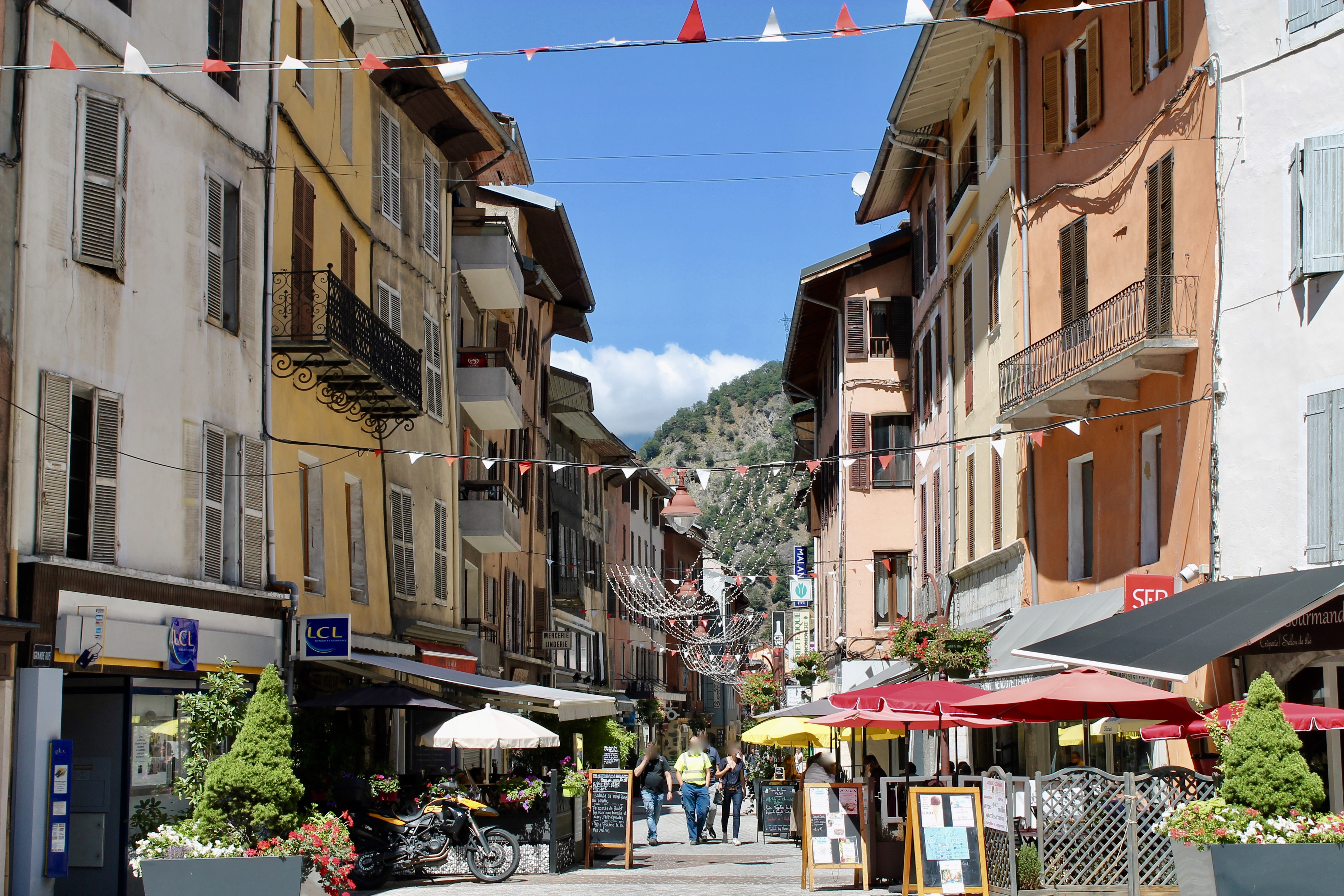 Grande Rue de Moûtiers.